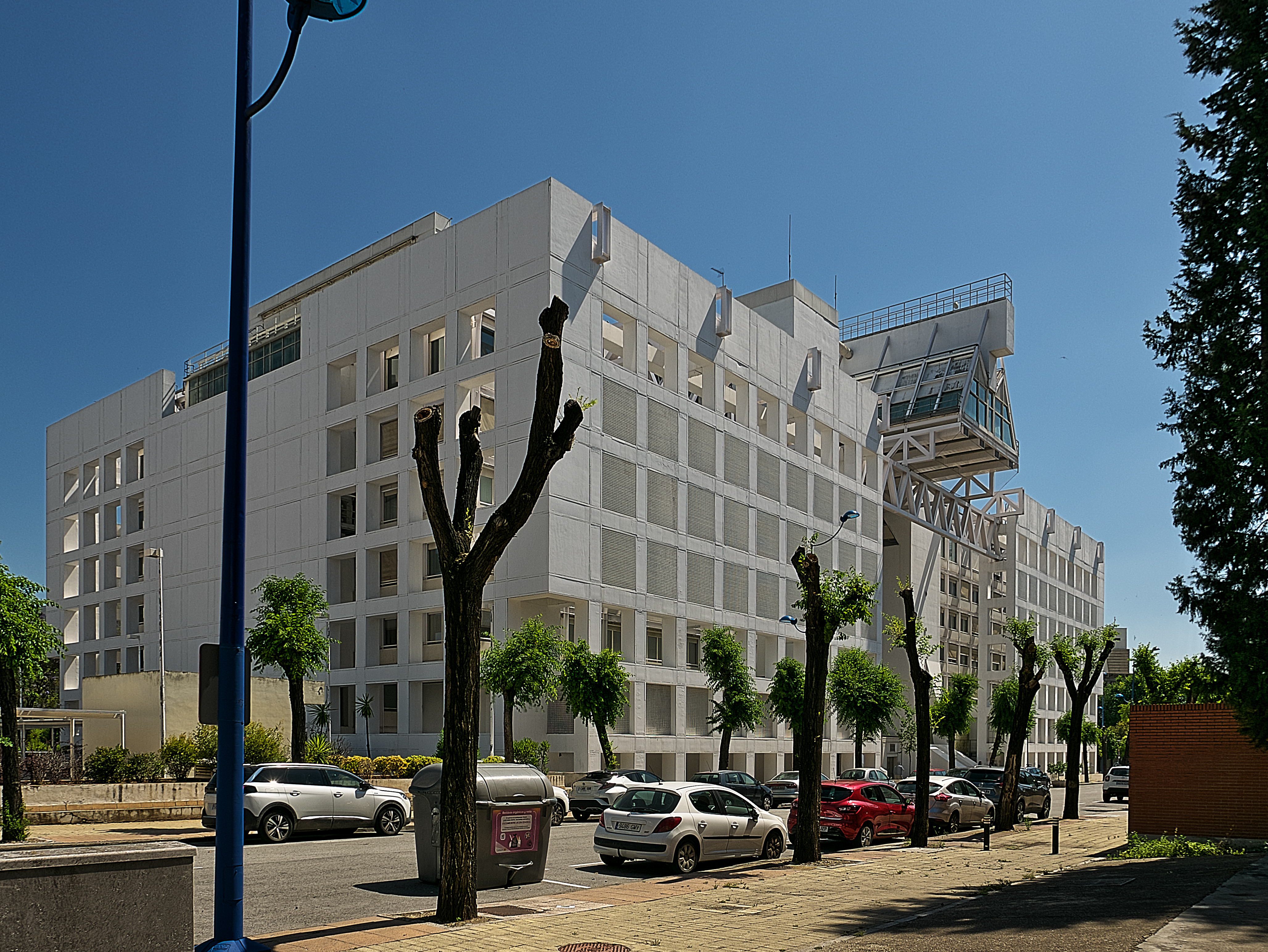 Un edificio de Gae Aulenti y Pierluigi Spadolini para la Exposición Universal de Sevilla de 1992.